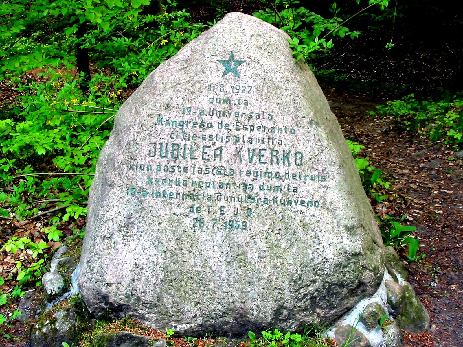 Teksto sur la ŝtono: 1.8.1927 • dum la • 19-a Universala • Kongreso de Esperanto • ĉi tie estis plantita • JUBILEA KVERKO • kiun poste faŝista regimo detruis • kverko replantita dum la • 15-a Internacia Junulara Kunveno • de T.E.J.O. • 26.7.1959